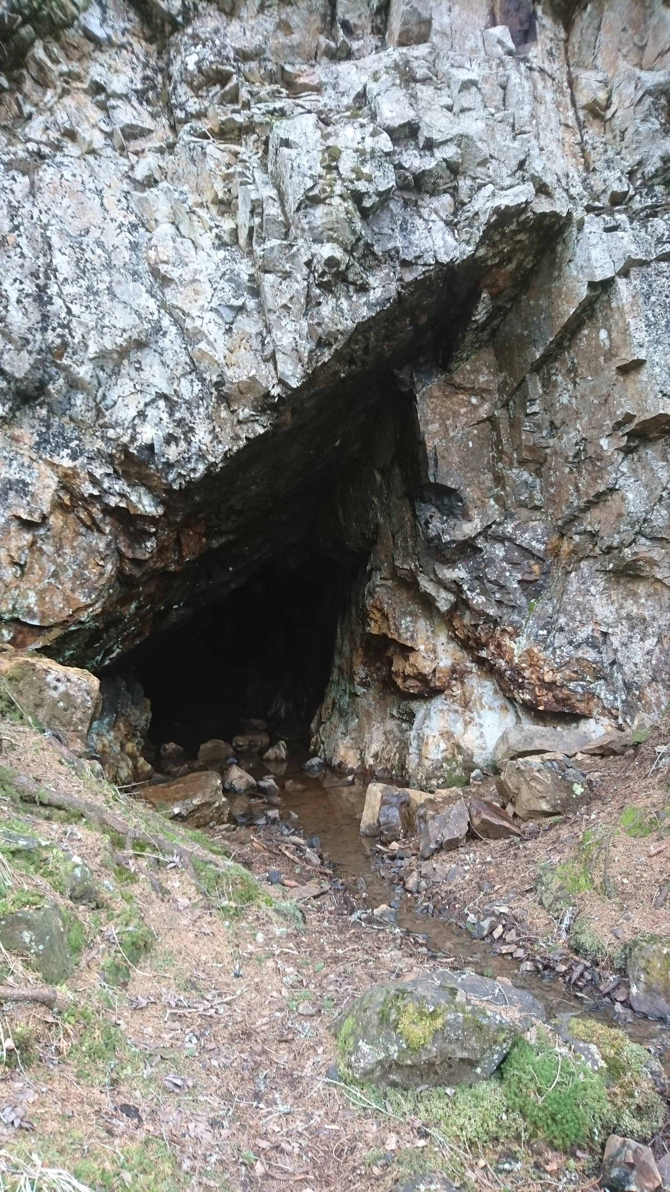 Inngang til Spenningsbygruva